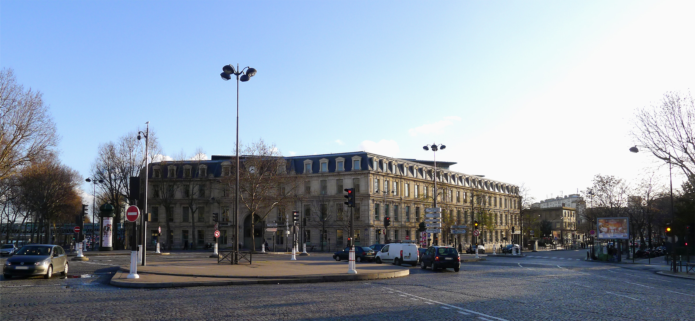 Place Valhubert - Paris V et XIII